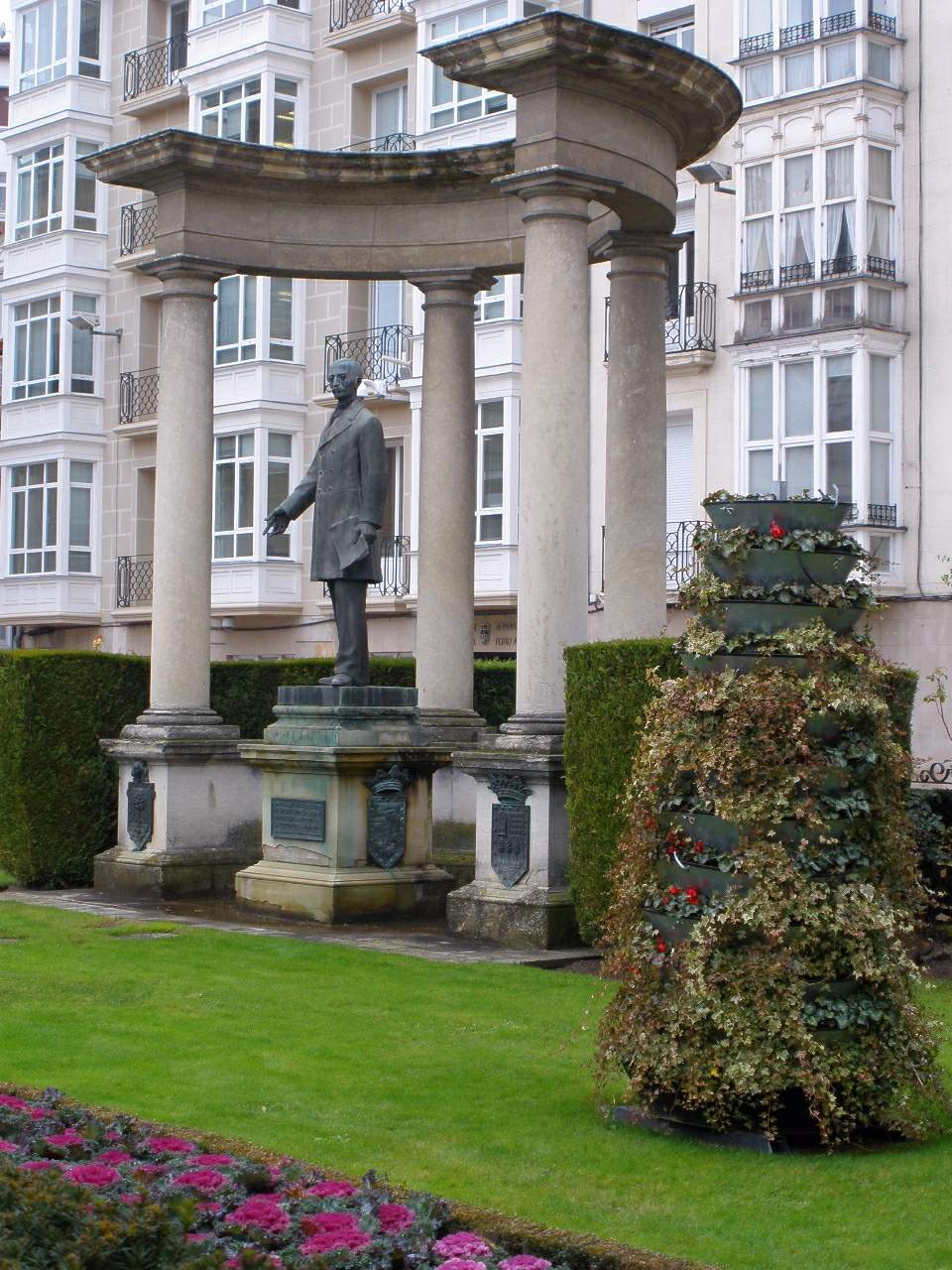 Diputación Foral de Álava, en Vitoria-Gasteiz